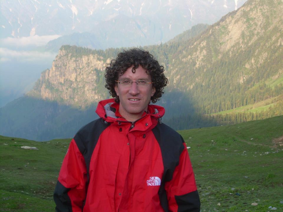 דוד שפרבר הוא אוצר, חוקר ומבקר אמנות, בעיקר יהודית וישראלית צילום בטיול בהודו בדרך ללדאק.